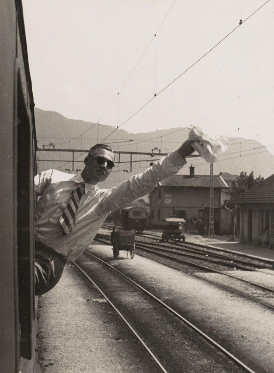 Nationaal Archief Beschrijving: Wim Lagendaal hangend uit de trein bij aankomst in Como. Nederland - Zwitserland (2-3), gespeeld op 27 mei 1934 in het San Siro-stadion in Milaan tijdens de Wereldkampioenschappen in Italië. Datum: 27 mei 1934 Vervaardiger: fotograaf onbekend Bestanddeelnummer: 3929 URL: [1] Voor meer informatie over het Nationaal Archief: Voor meer foto's uit deze en andere collecties, bezoek onze Beeldbank:, U kunt ons helpen onze kennis van de fotocollecties te verrijken door tags en commentaren toe te voegen. Herkent u mensen of locaties of heeft u een bijzonder verhaal te vertellen bij één van de foto's, laat dan een reactie achter (als u ingelogd bent bij Flickr) of stuur een mailtje naar